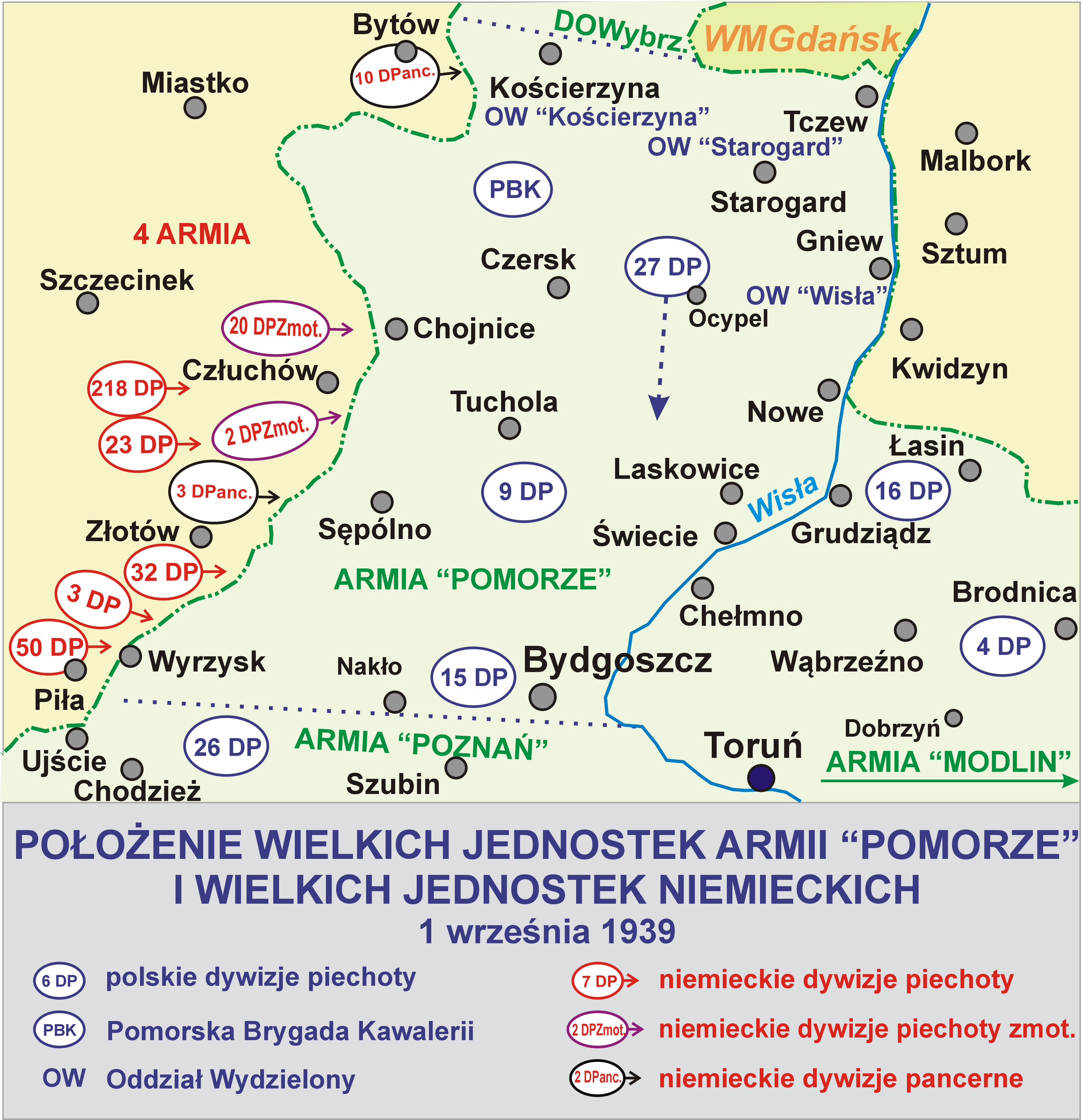 Położenie wielkich jednostek Armii "Pomorze" i wielkich jednostek niemieckich 01-09-1939